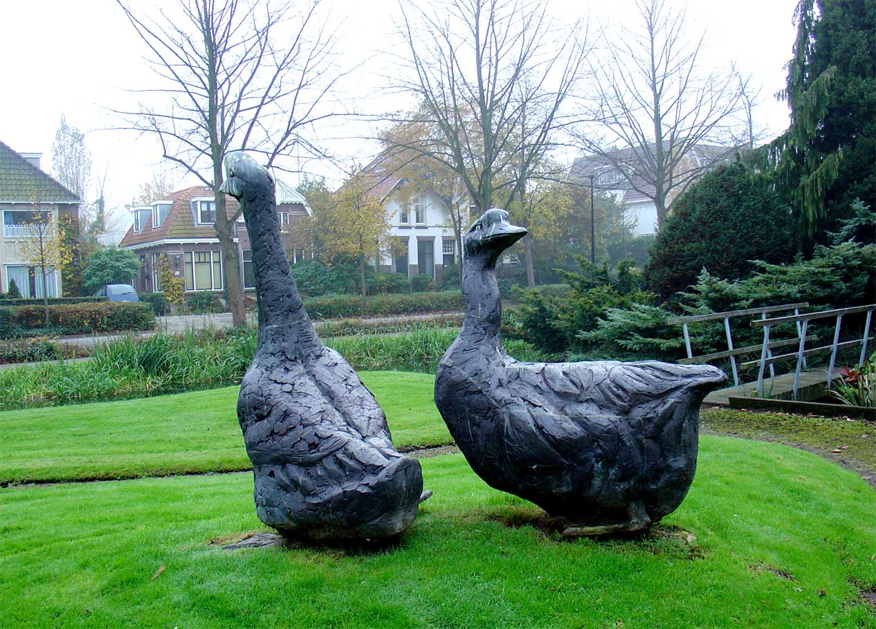 De ganzen (brons, 1979) door Ineke van Dijk - stonden oorspronkelijk voor het St. Jozefpaviljoen aan de Graaf Florisweg maar zijn in mei 2014 verplaatst naar het Groene Hart ziekenhuis aan de Bleulandweg in Gouda.